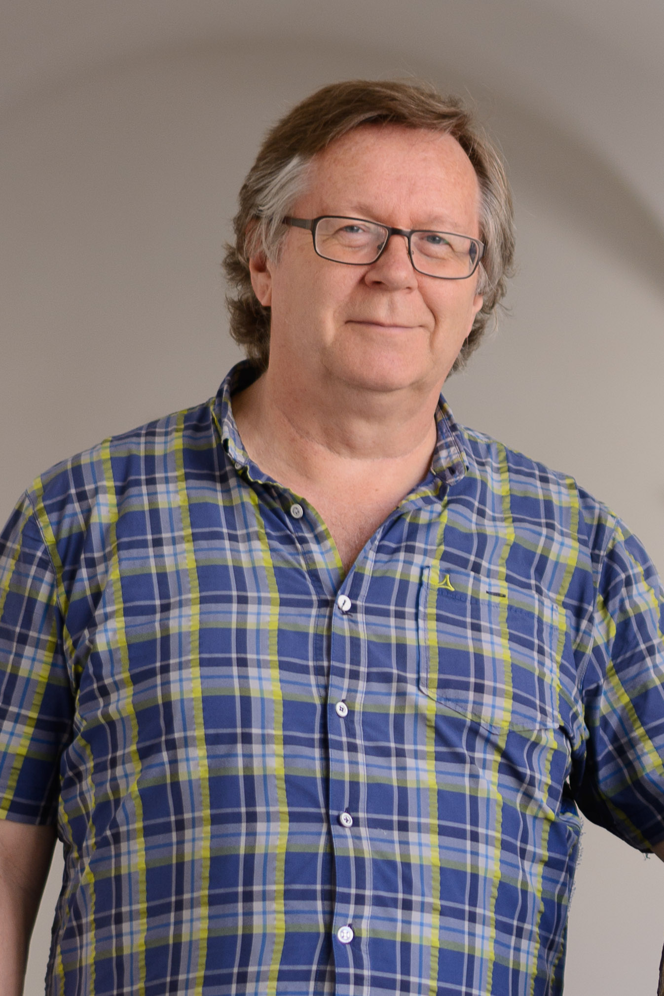 Franz Weinzettl, Autor